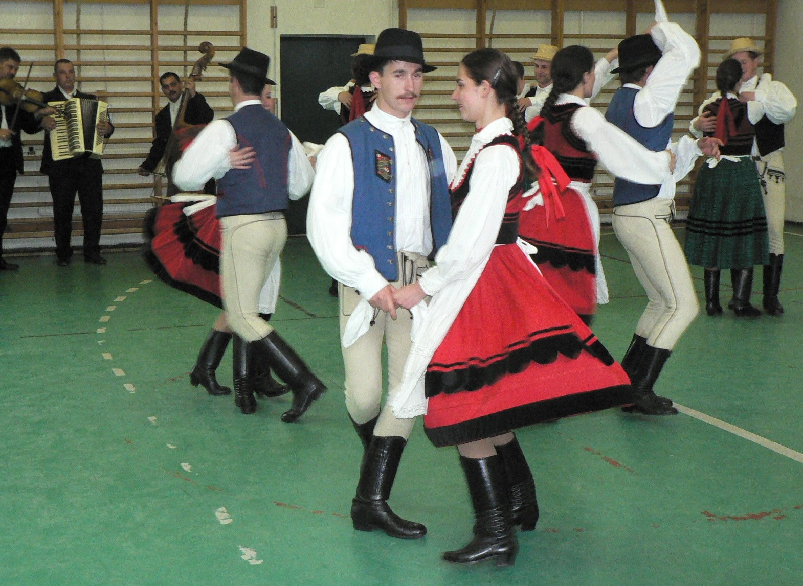 A Hargita Nemzeti Székely Népi Együttes fellépése Solymáron